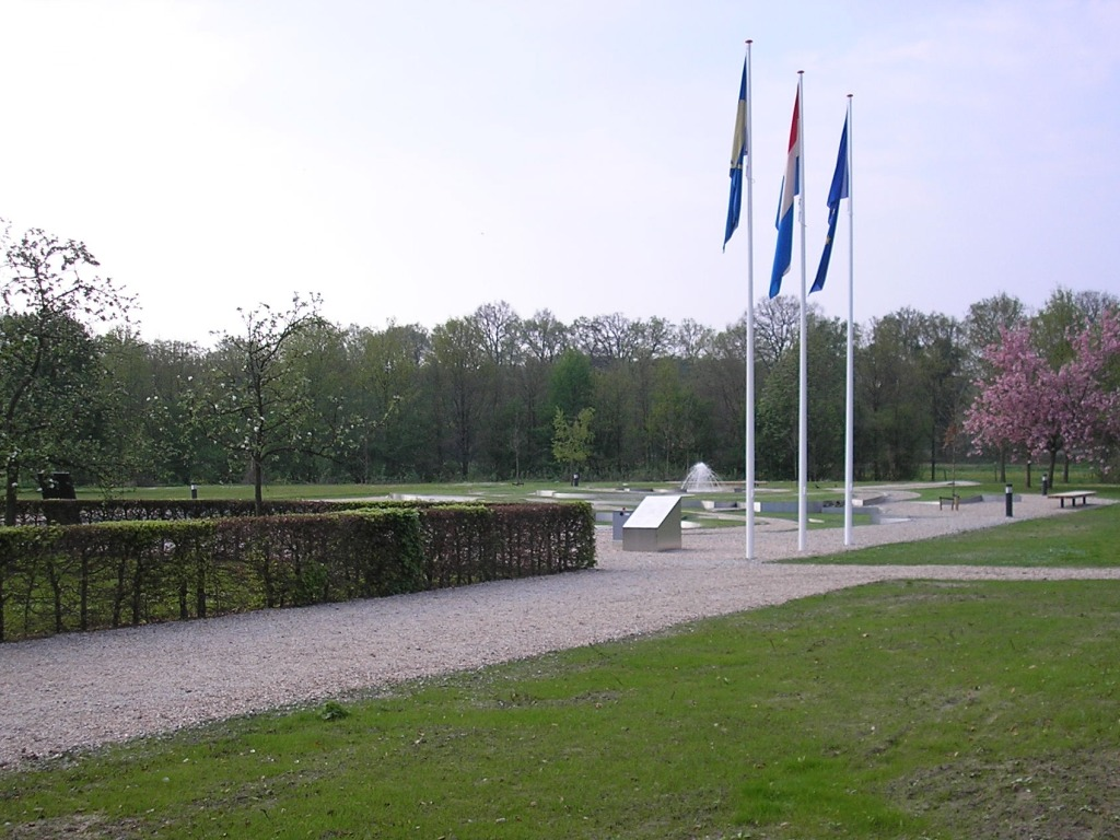 Tuin van Bezinning; Aanzicht op entree vanaf koetshuis. Nationaal monument ter ere van tijdens de uitoefening van de dienst overleden Nederlandse politiemensen. Locatie: Achter koetshuis van Huis 't Velde te Warnsveld (NL)